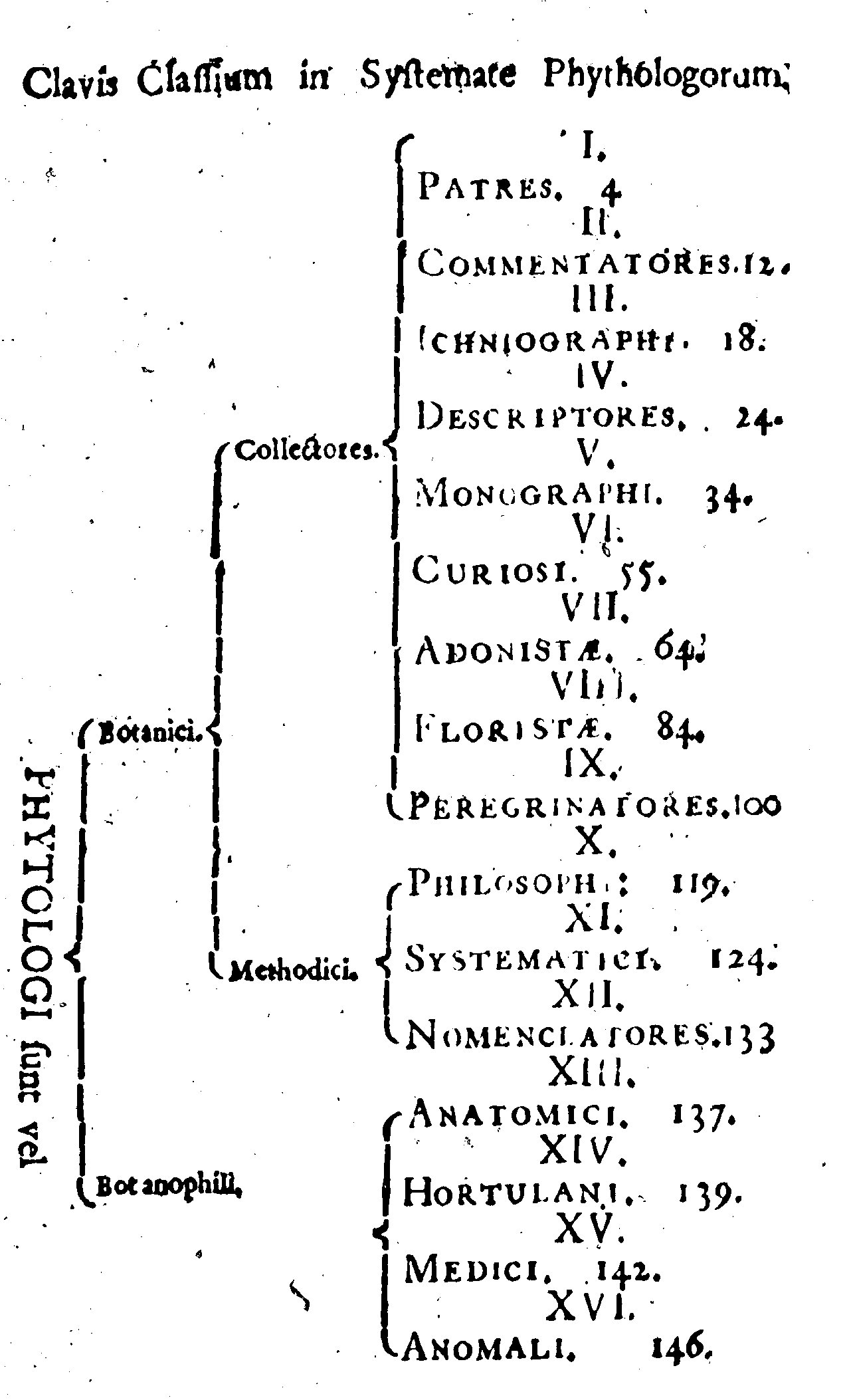 Das von Linné in Bibliothca Botanica angewandte System um Autoren zu klassifizieren.